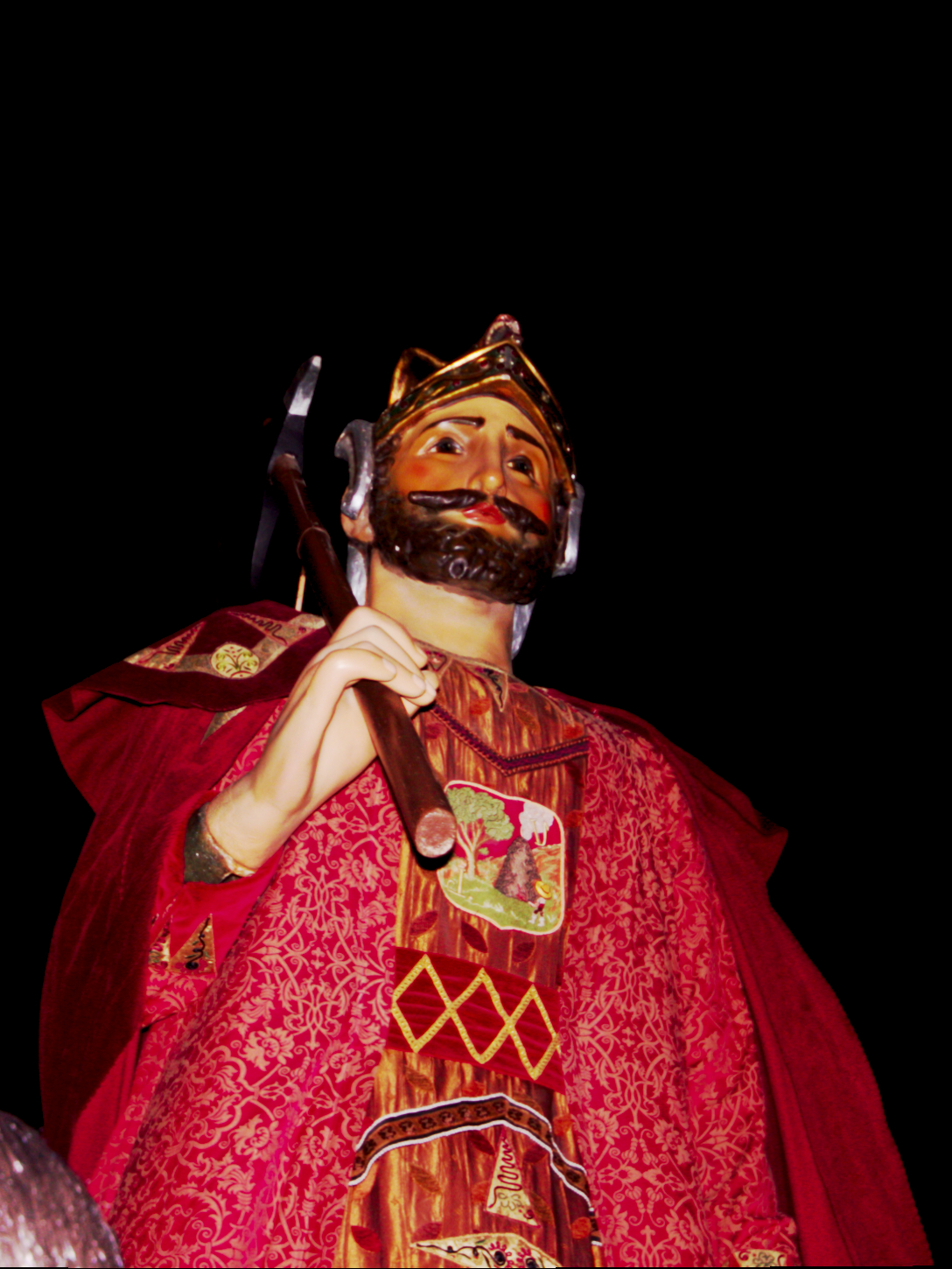 Feste de Santa Eulalia 2014